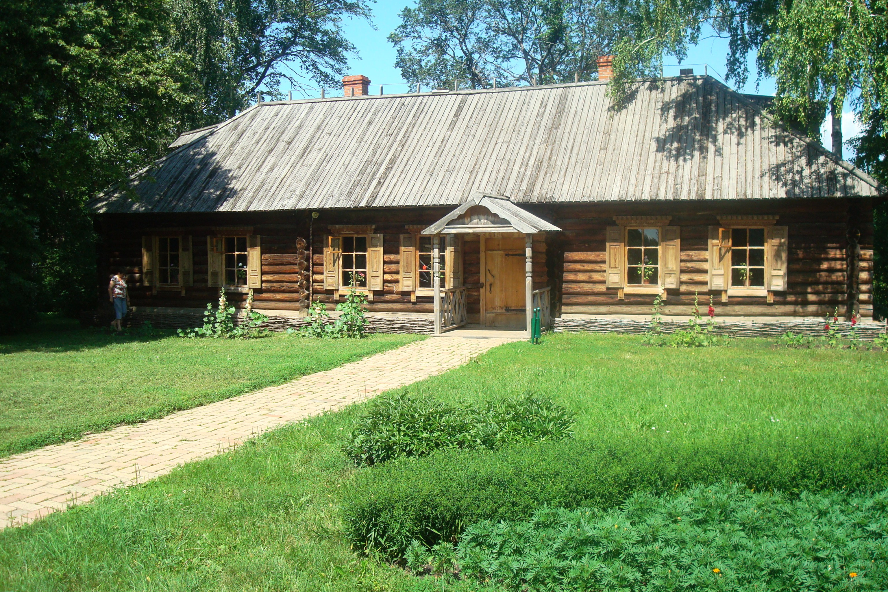 Пензенская область, с. Лермонтово, Государственный Лермонтовский музей-заповедник "Тарханы"